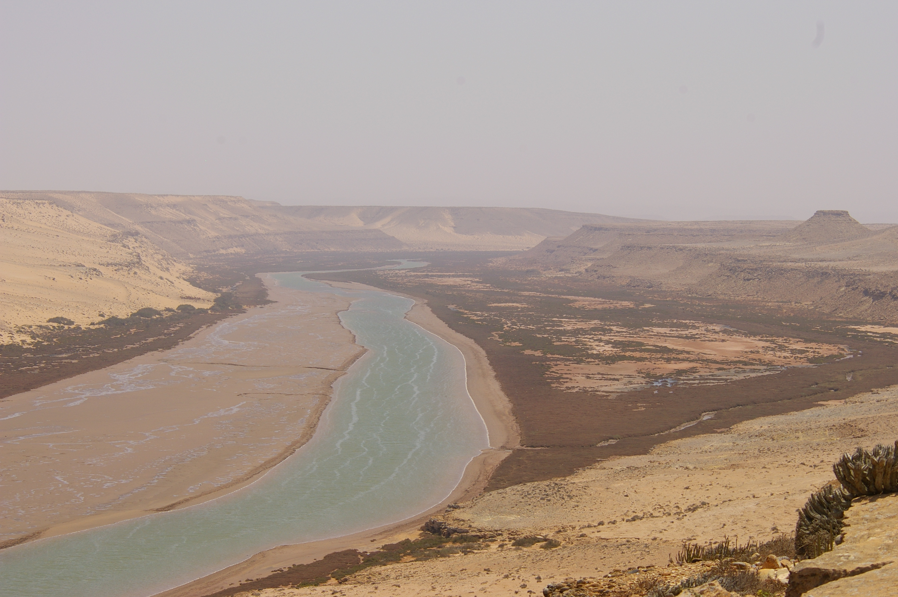 Le fleuve Drâa, à quelques 500 mètres de son embouchure. Le fleuve sort de son dernier canyon pour passer entre les dunes.